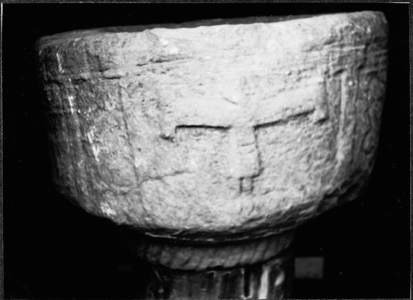 Dopfunt, cuppan. Kategori: (04) DopfuntarDopfunt, cuppan.